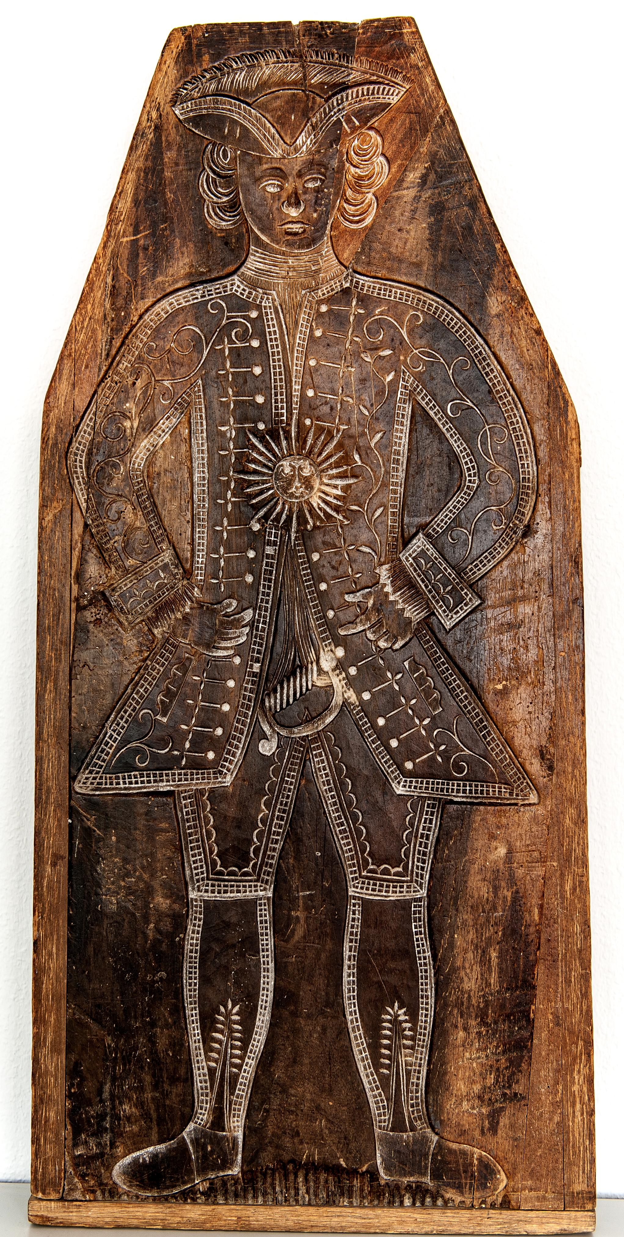 86 cm hohe Printenform aus dem 17. Jahrhundert mit dem typischen Sonnen-Emblem von Lambertz im Bestand der Aachener Printenfabrik Henry Lambertz